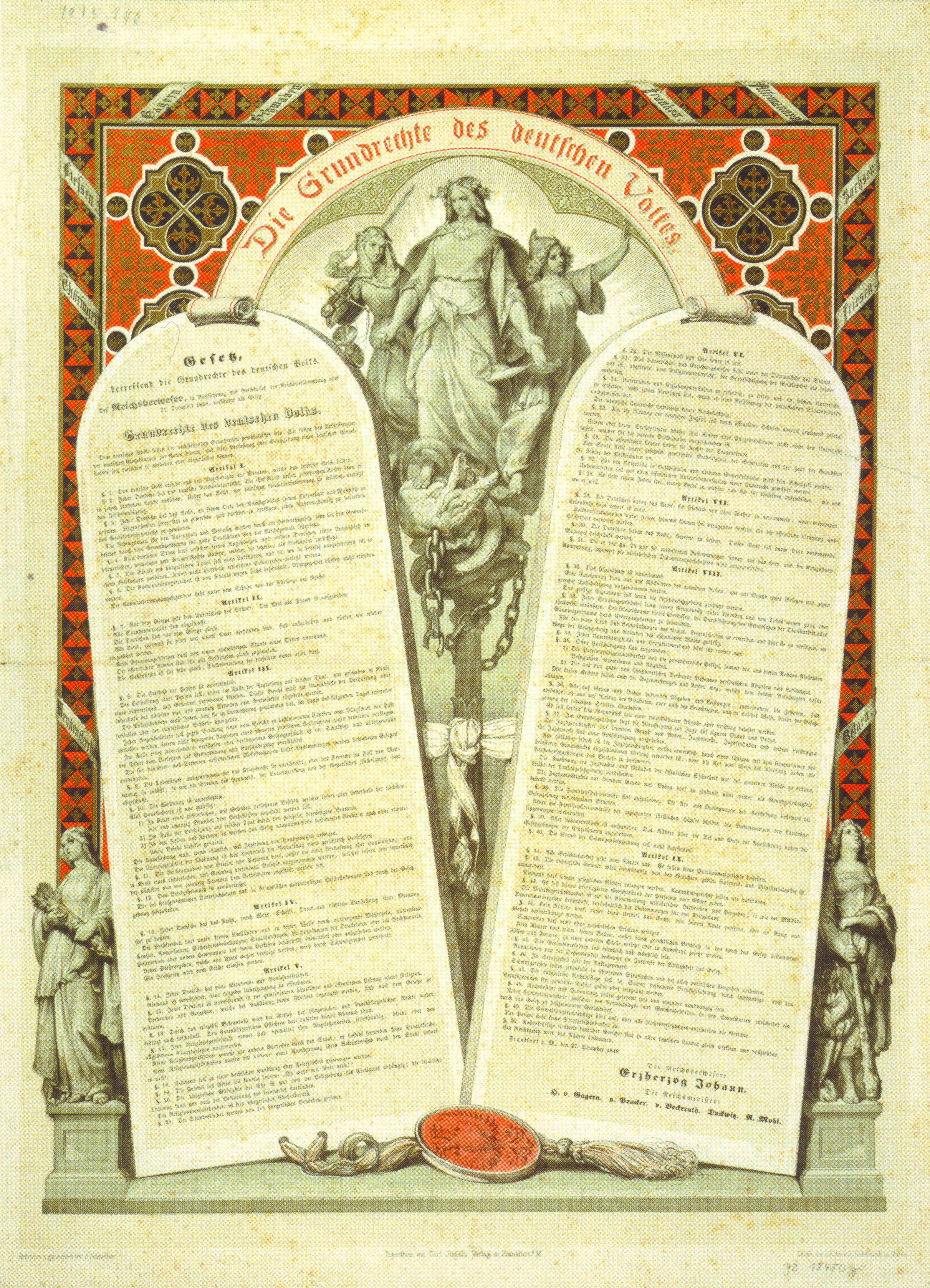 Kolorierte Lithographie, Adolf Schroedter. Frankfurt, 1848. “Die Grundrechte des deutschen Volkes”.